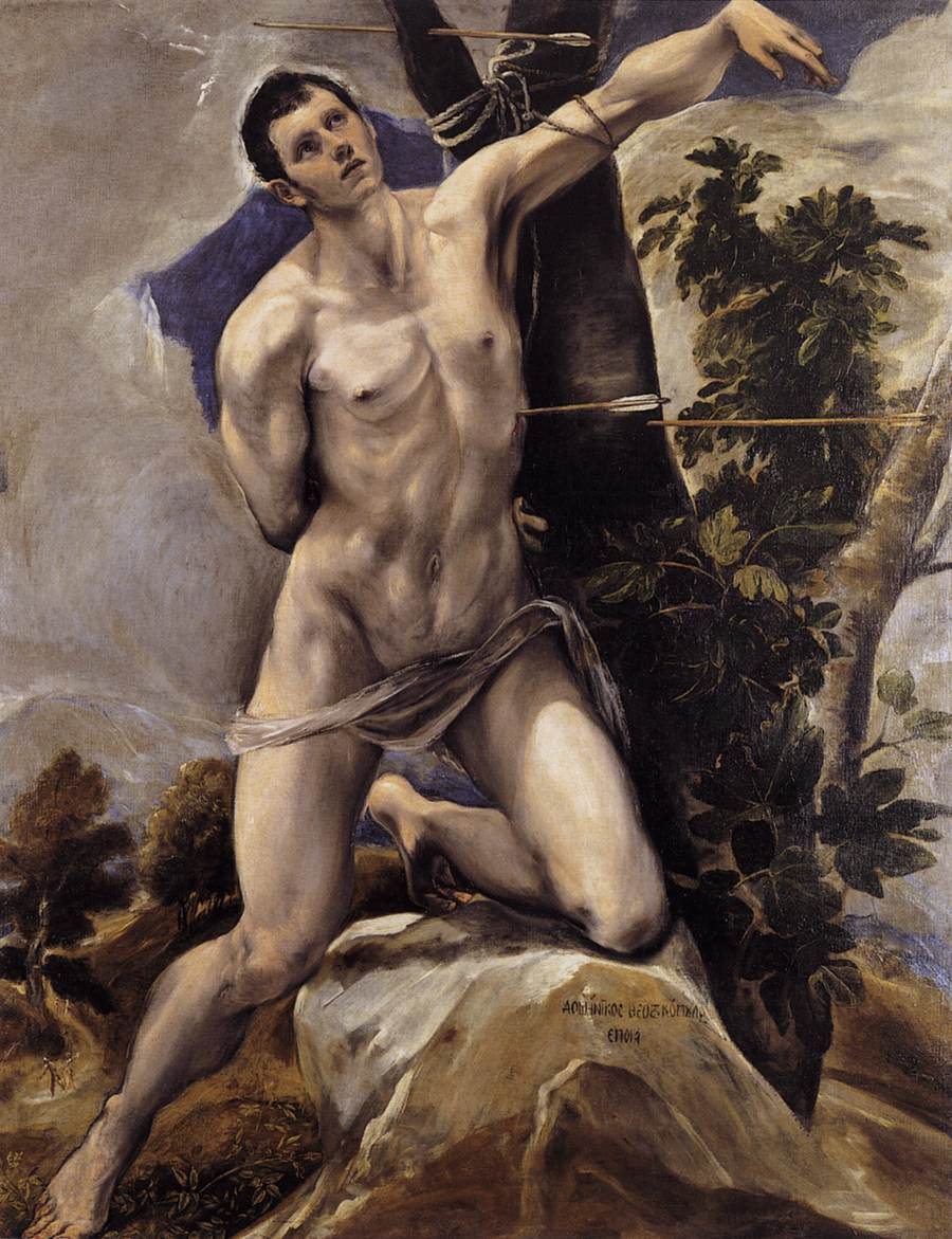 La obra representa el martirio de San Sebastián.